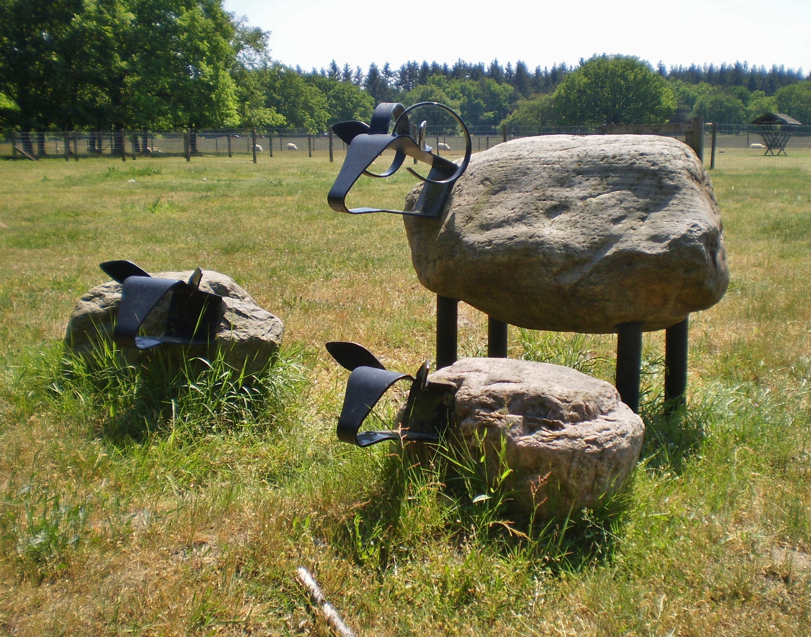 Schapen